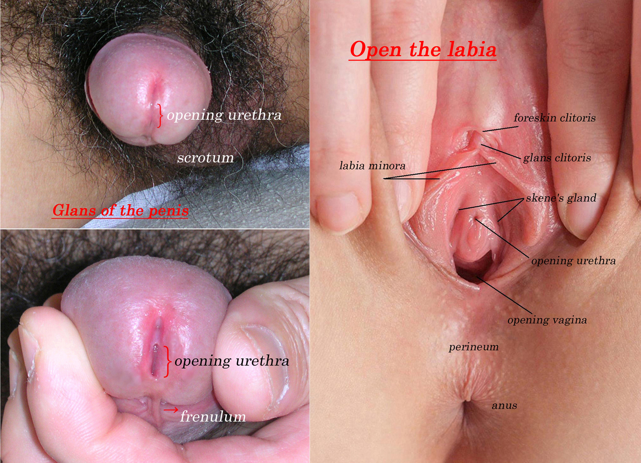 単なる興味本位ではなく正しい知識は必要不可欠である。